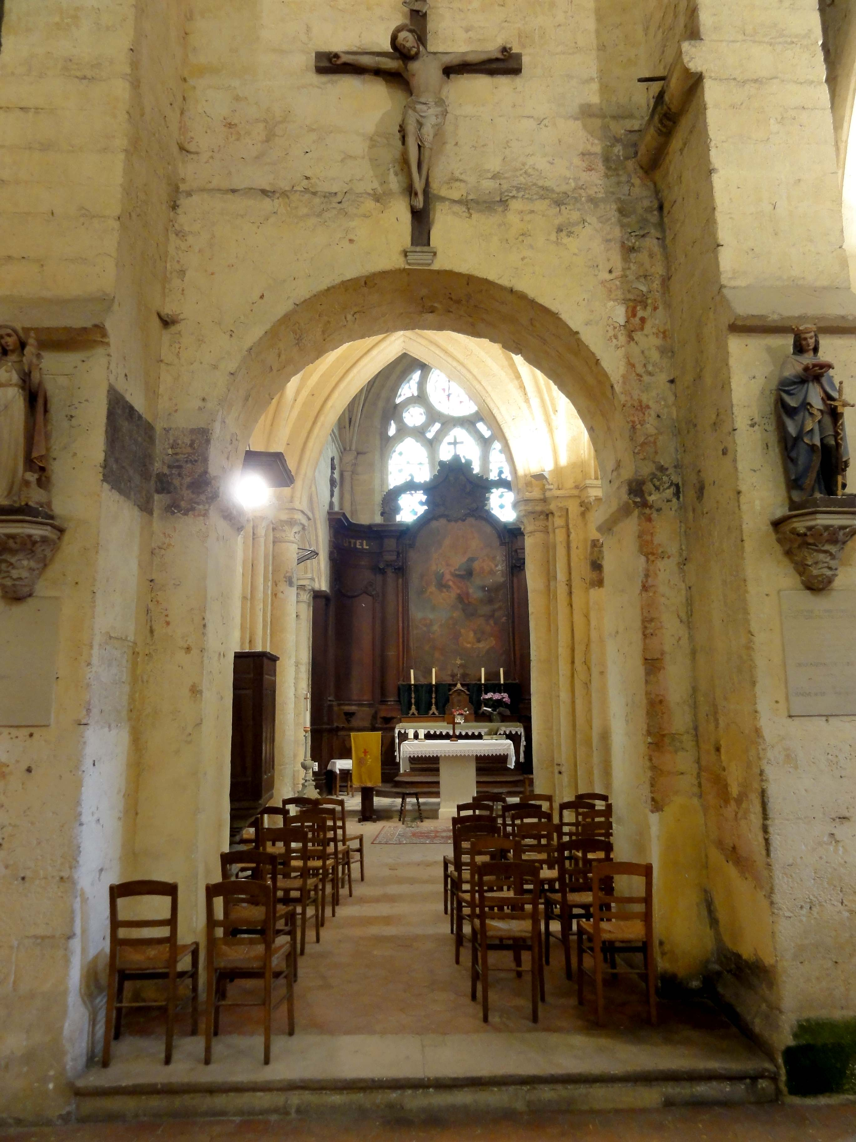 Intérieur de l'église (voir titre).